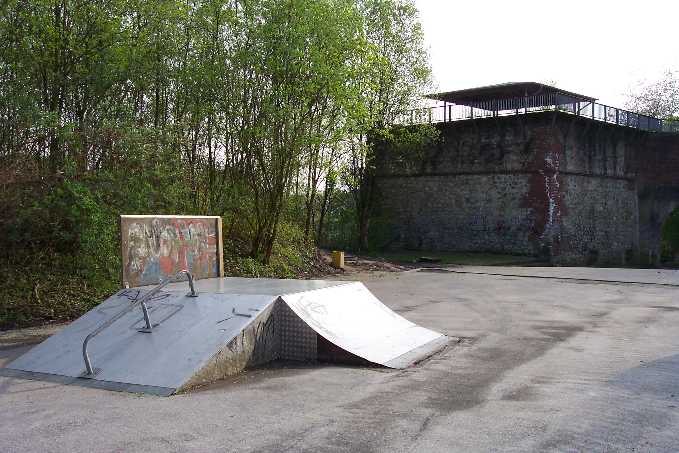 Der Eulenkopfweg, Wuppertal